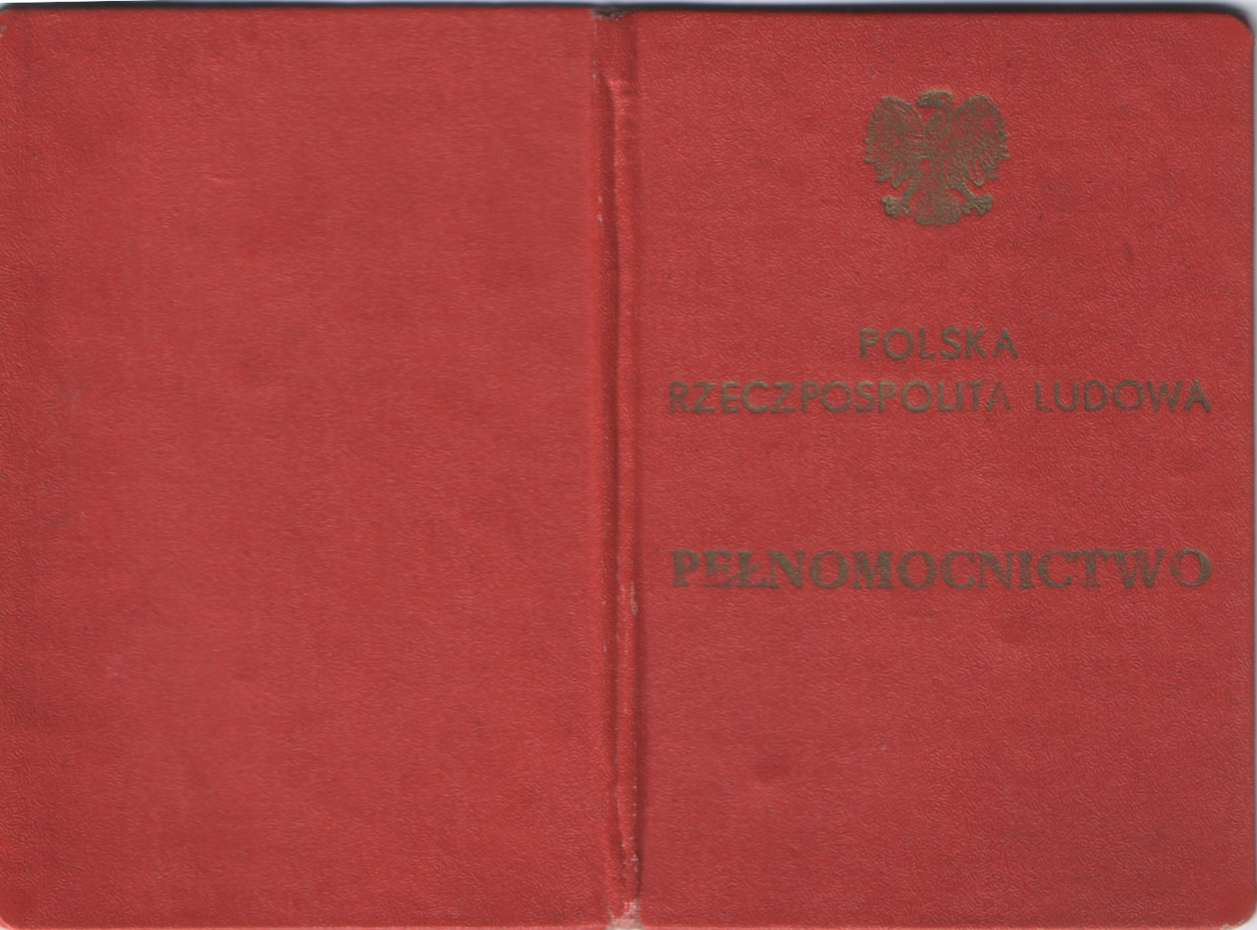 Pełnomocnictwo graniczne (okładki) na odcinek granicy od znaku granicznego nr IV/160 do znaku granicznego nr IV/170 na granicy polsko-czechosłowackiej, odcinek strażnicy WOP Gierałcice